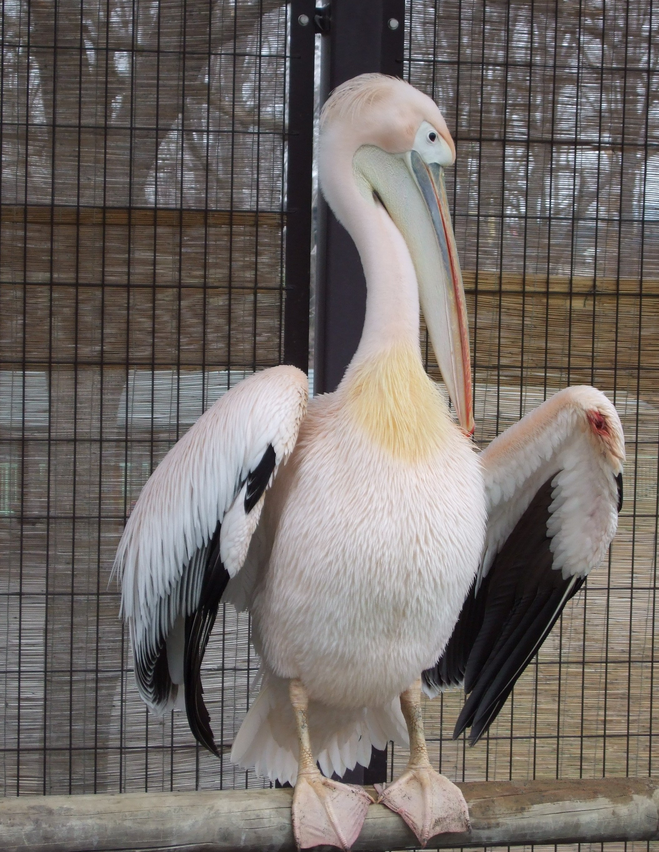 ペリカン（モモイロペリカン）。a pelican. 200604 Obihiro Japan.